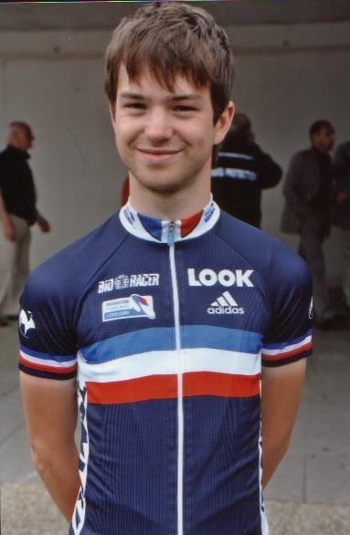 Sélection en équipe de France